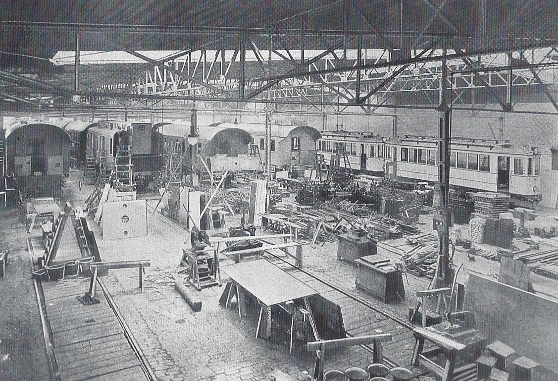 Montagehalle der Waggonfabrik L. Steinfurt in Königsberg